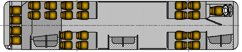 Варіант планування салону автобуса MAN SL 223 виробництва Man Kamyon Ve Otobus San AS (Туреччина) із 24 сидіннями